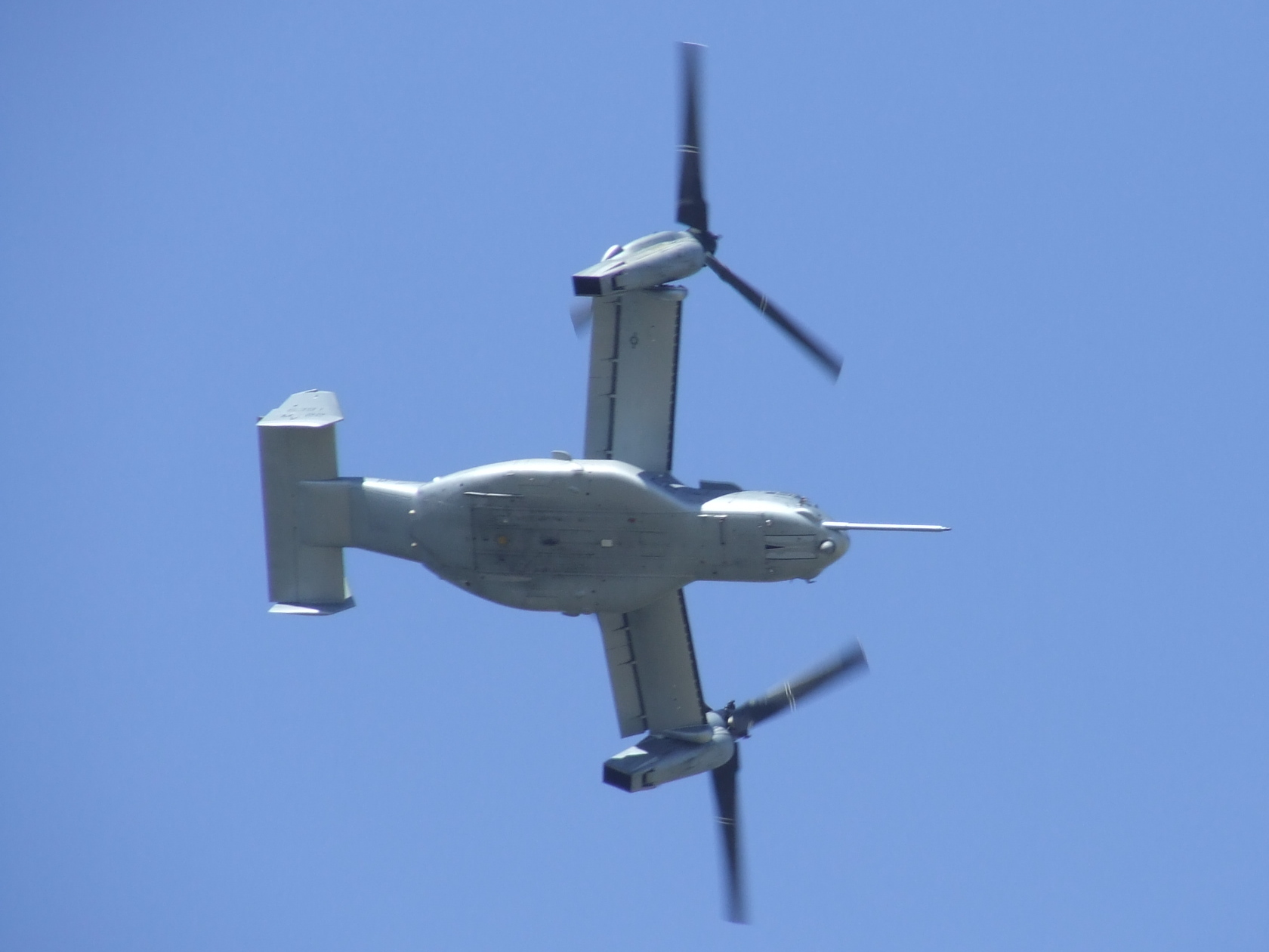 Bell-Boeing V-22 Osprey